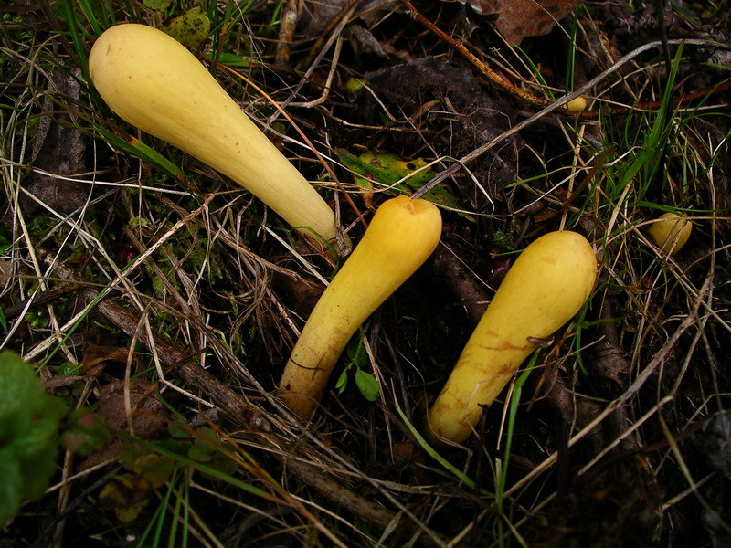 Piestinis pirštūnis (Clavariadelphus pistillaris)